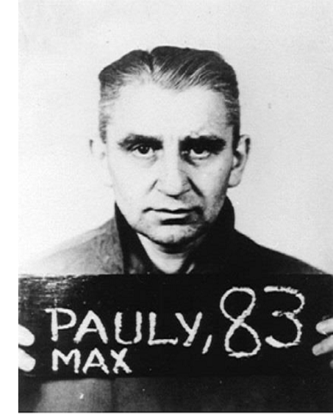 Max Pauly (1907-1946), deutscher SS-Führer und Kommandant des KZ Neuengamme. Aufnahme Paulys nach seiner Festnahme 1945.